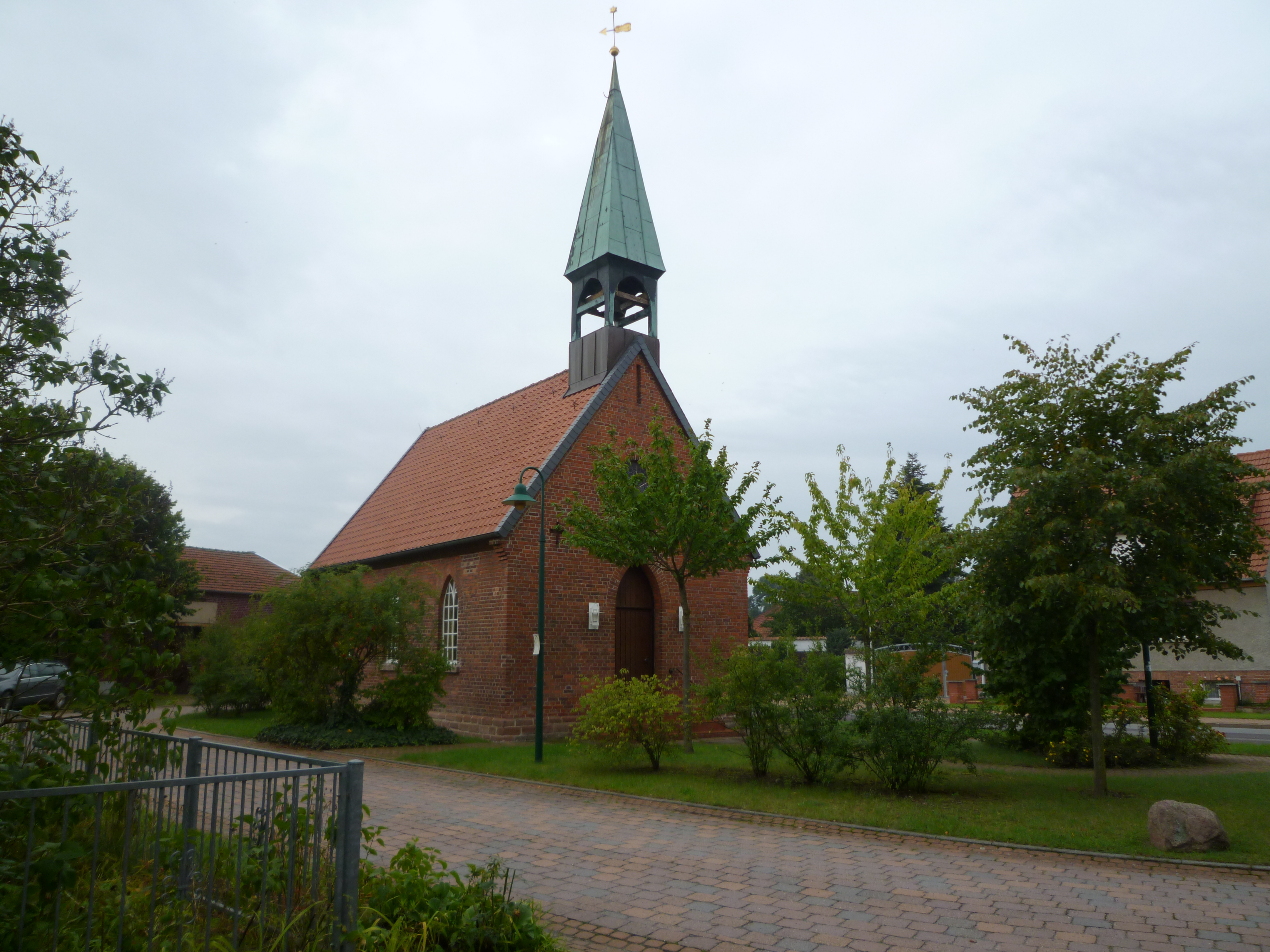 Dorfkirche in Elsebeck im September 2010